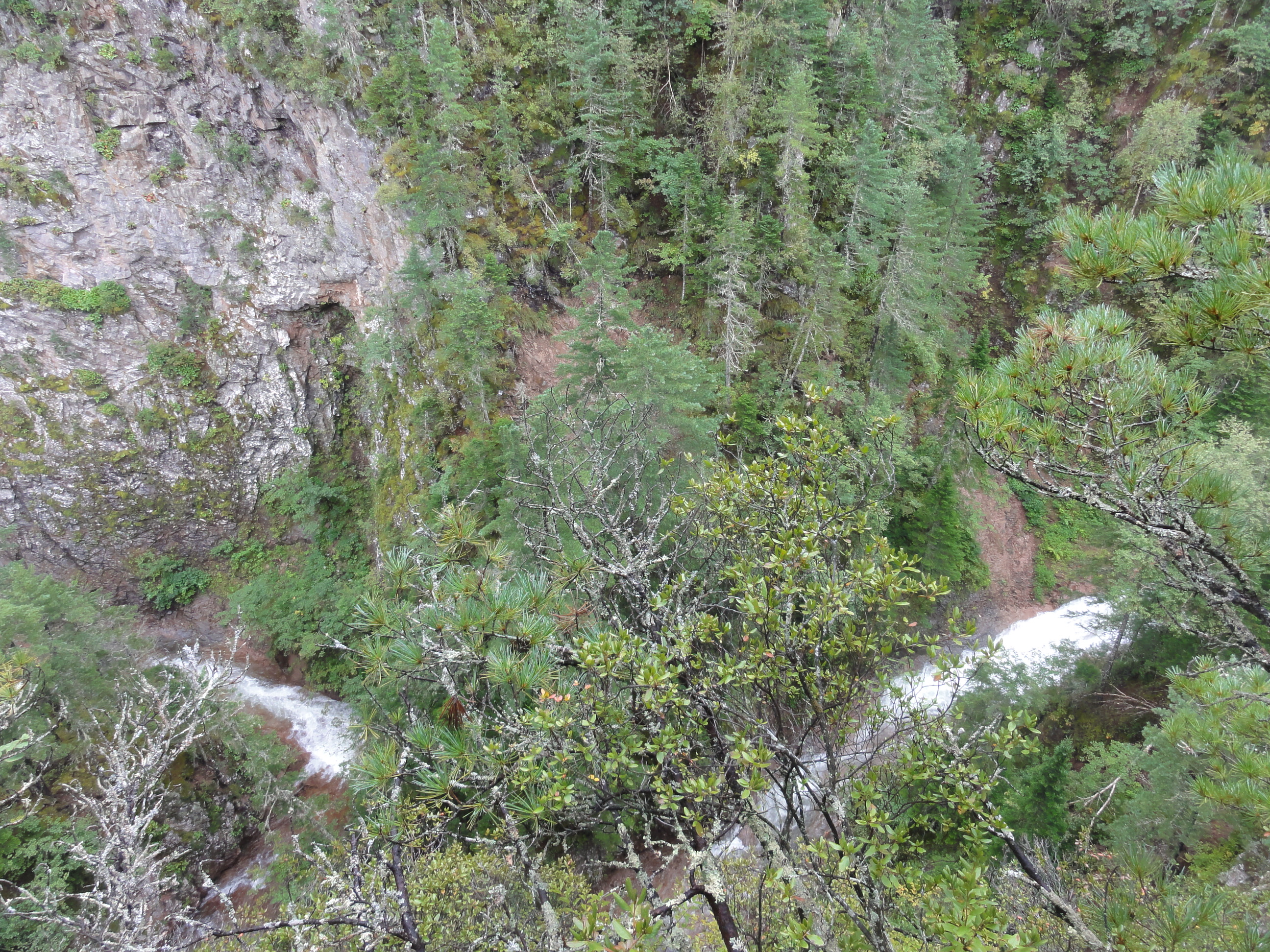 Верхняя часть каньона Пасть Дьявола и река Средняя Амгу